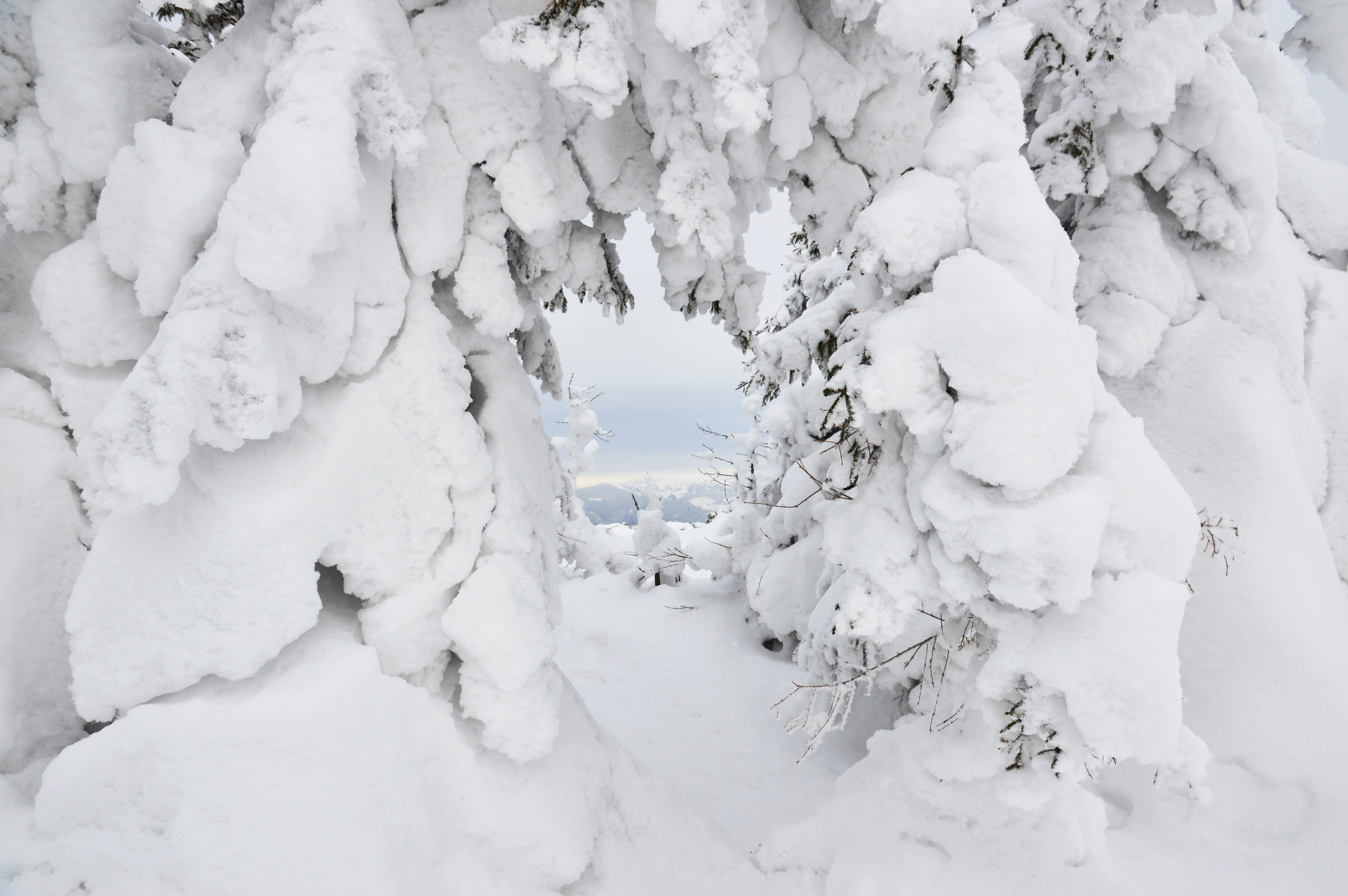 Кухта - налипання снігу на гілках дерев - в умовах високої вологості та низької температури. Мармароський масив Українських Карпат.